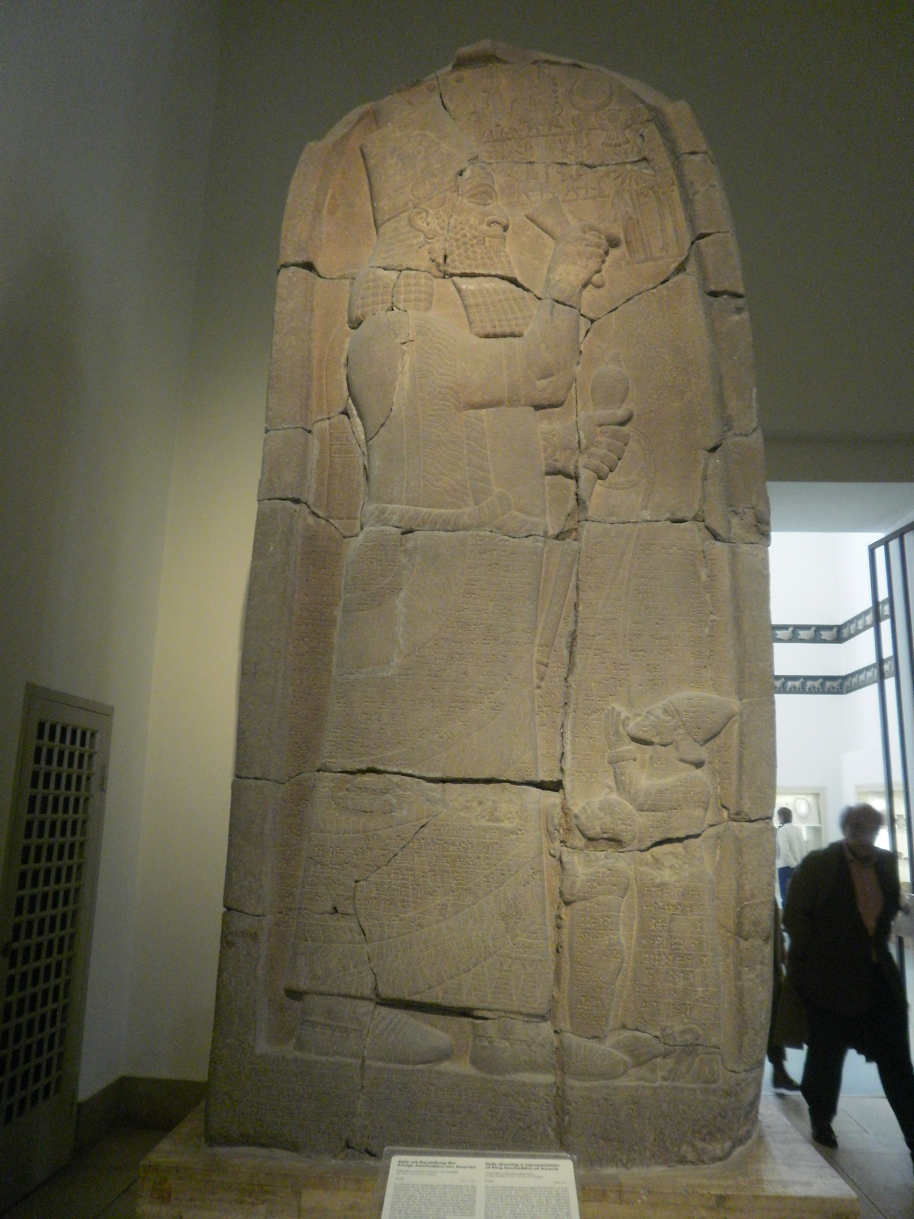 Stèle représentant le roi Assyrien Assarhaddon (grandeur nature) au musée de Pergam (Berlin)